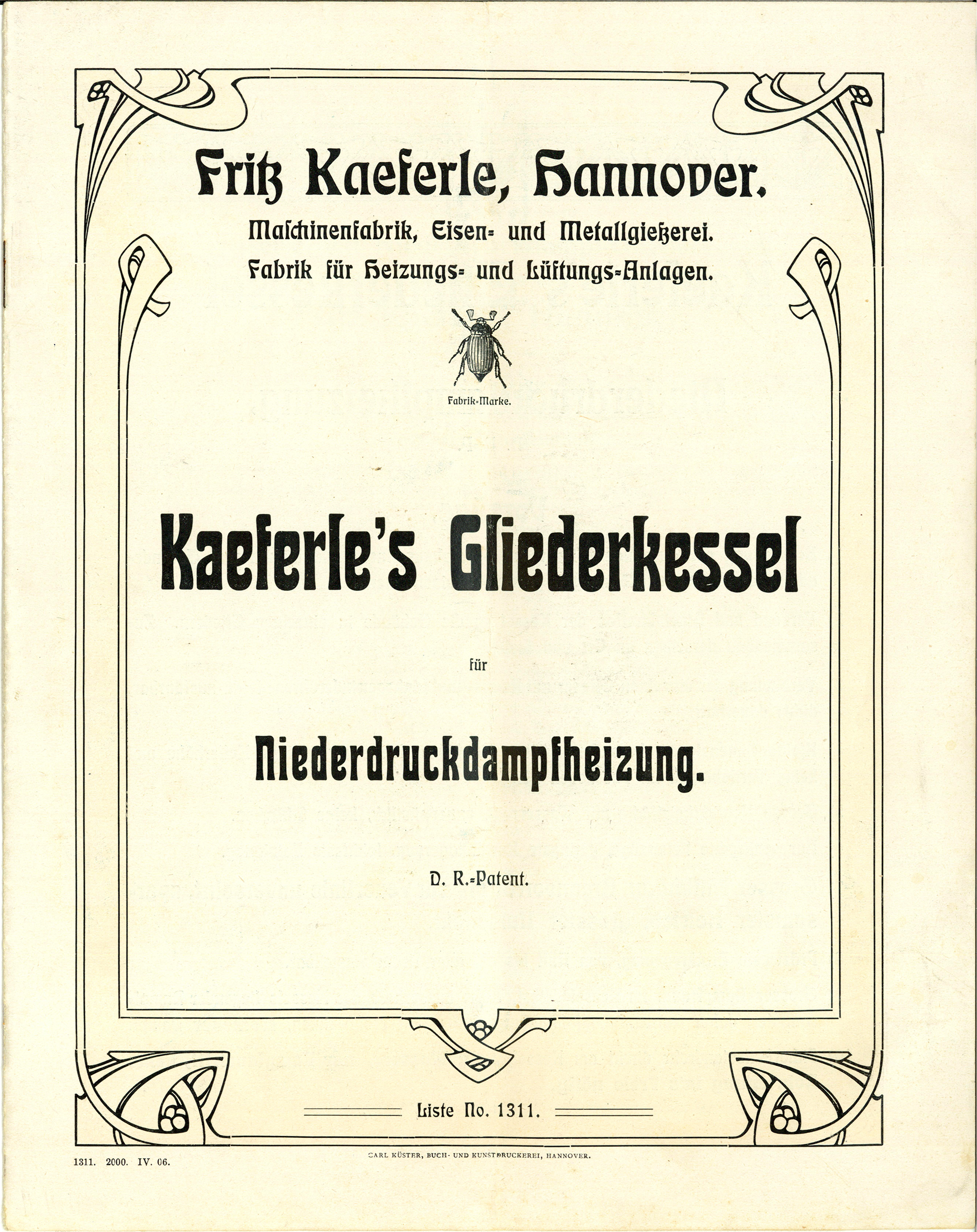 Titelblatt der "Liste No. 1311" der Firma Fritz Kaeferle: „Fritz Kaeferle, Hannover. Maschinenfabrik, Eisen- und Metallgießerei. Fabrik für Heizungs- und Lüftungs-Anlagen. / Fabrikmarke / Kaeferle's Gliederkessel für Niederdruckdampfheizung. D.R.-Patent.“ Die insgesamt 12seitige Broschüre hat die Maße circa 22,4 cm x 28,4 cm. Die Angaben am Fuß des Titelblattes geben folgende Auskünfte: Die Schrift wurde in einer Auflage von 2000 Exemplaren hergestellt durch die Druckerei Carl Küster, Buch- und Kunstdruckerei, Hannover. Derzeit ist noch unbekannt, ob parallel zu der Broschüre auch eine gesonderte Preisliste gedruckt wurde.